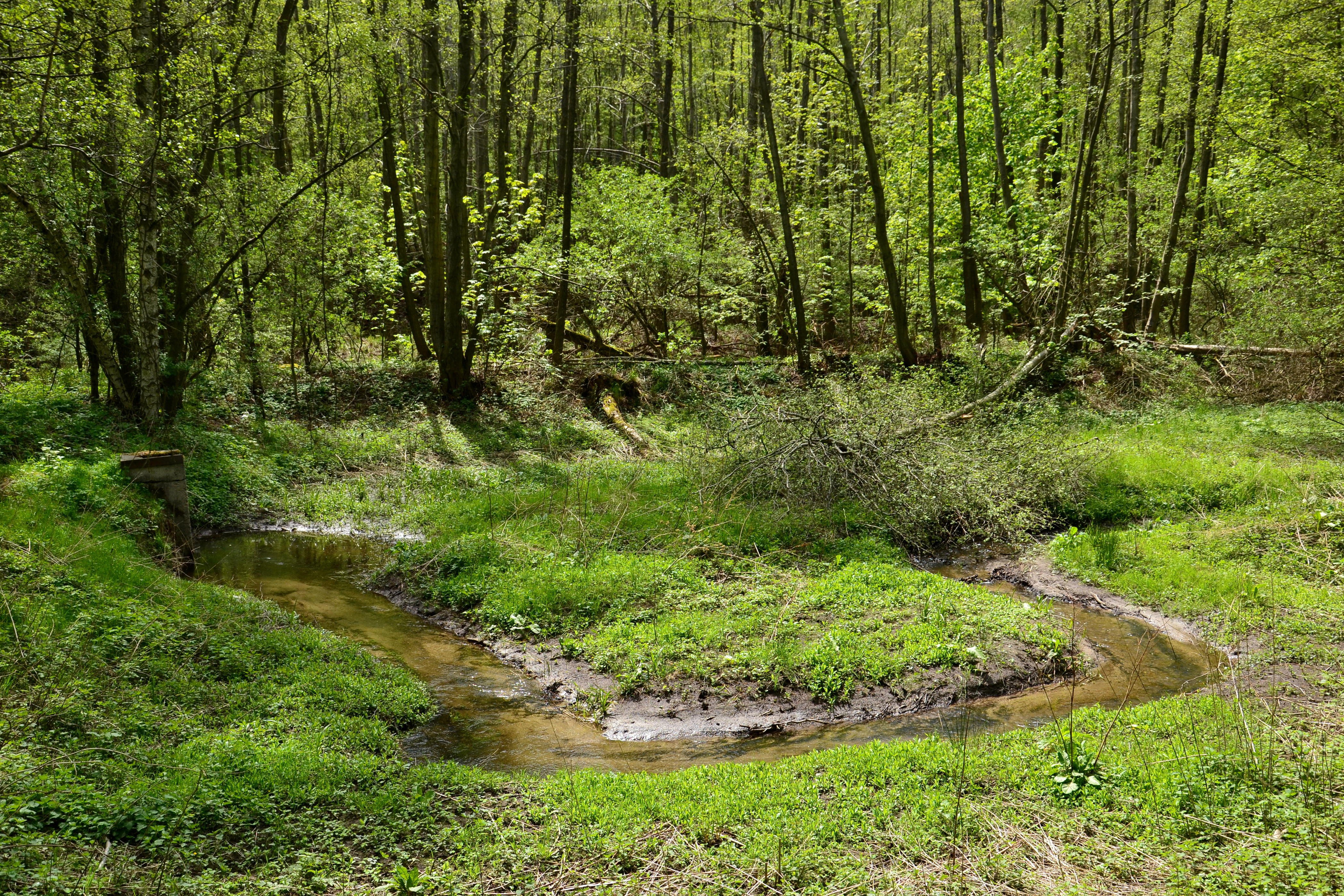 PP Podmilesy - Podmileský potok